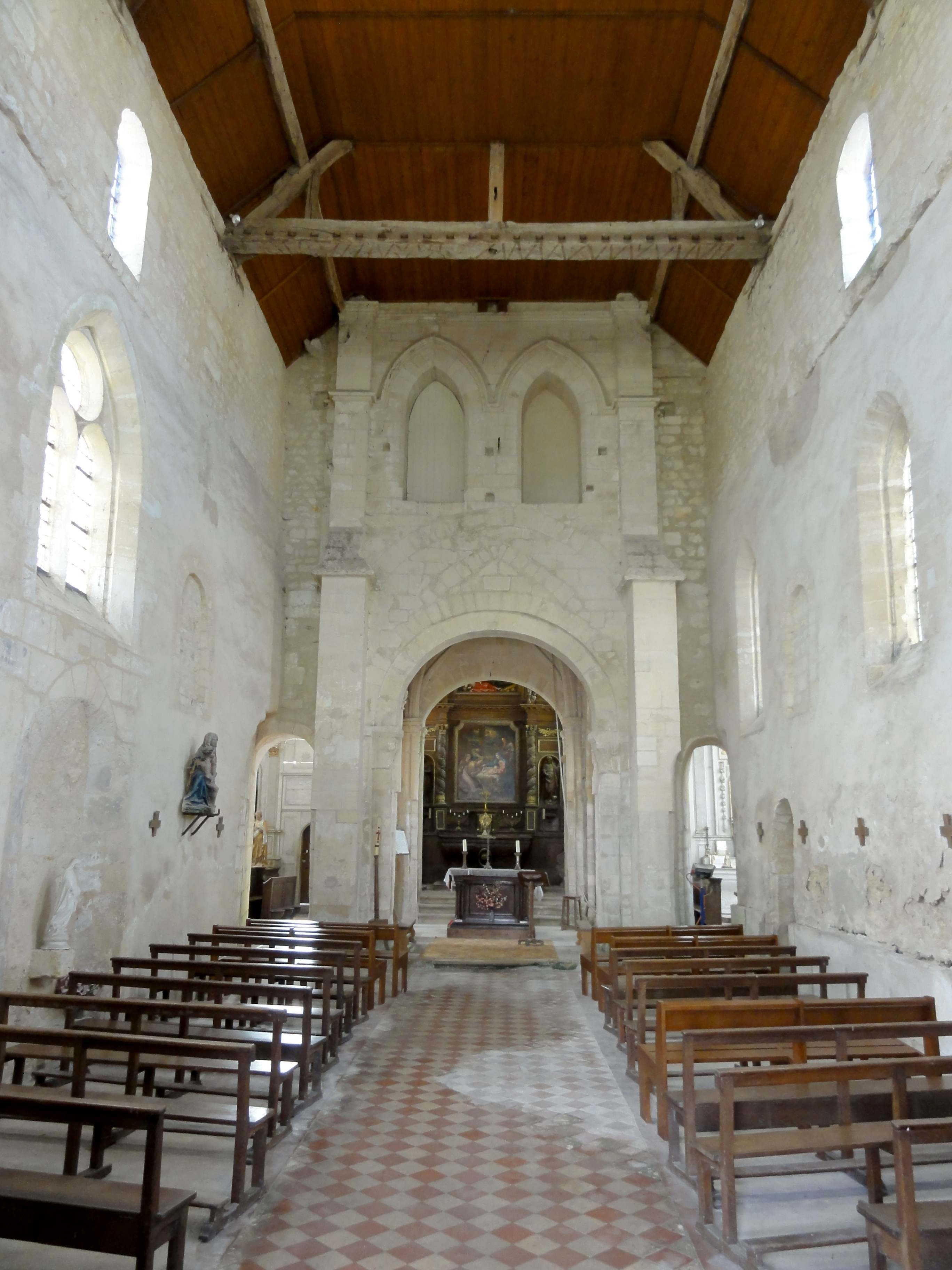 Intérieur de l'église (voir titre).